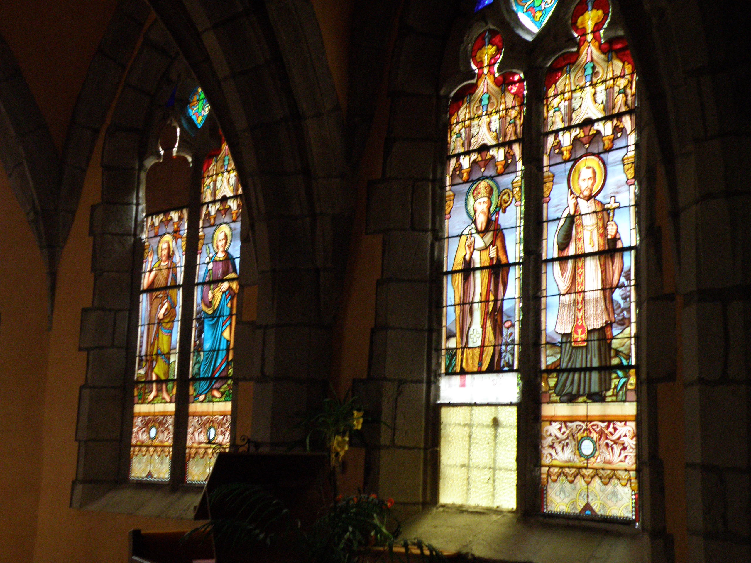 Allègre, dép. de Haute-Loire, France. Vitraux de l'église.